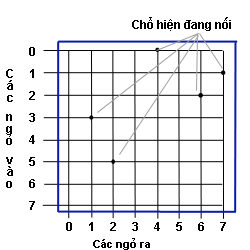 Phanbo